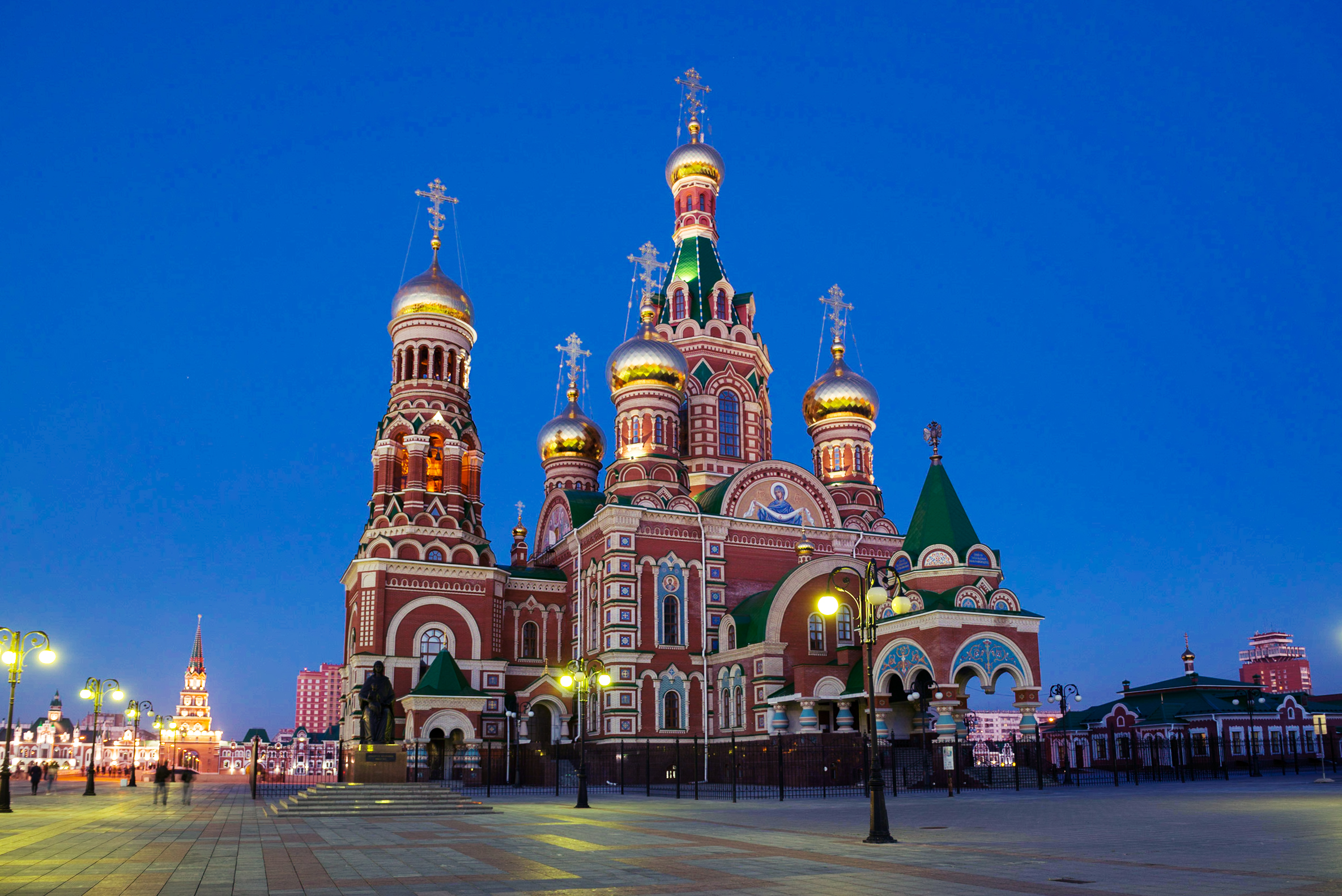 Город Йошкар-Ола: территория города, Йошкар-Ола, Марий Эл